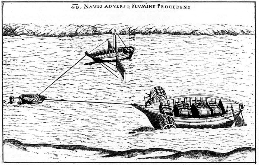 Entwurf zur Seilschifffahrt von Fausto Veranzio (um 1595)